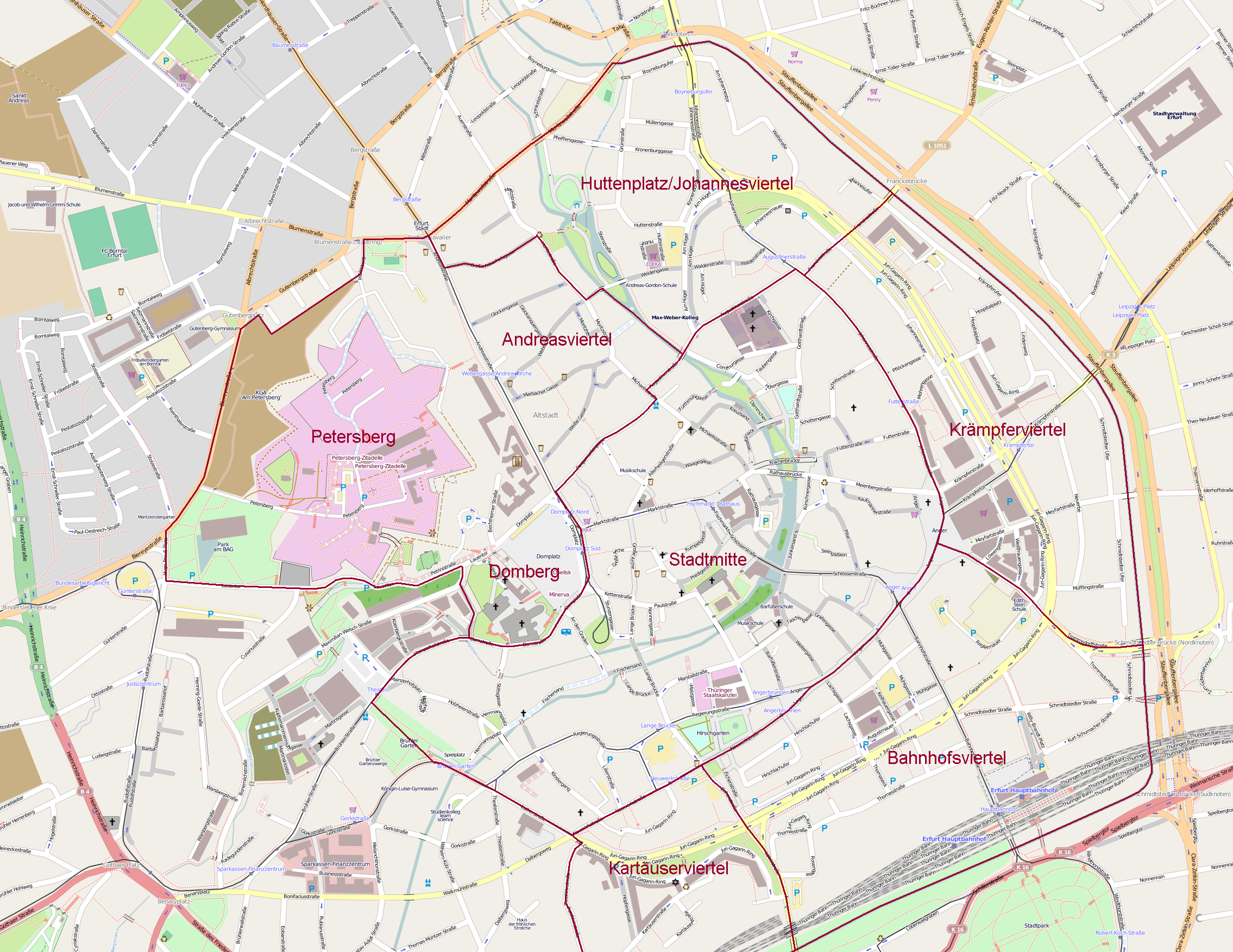 Eine Karte der Viertel im Stadtteil Altstadt von Erfurt.